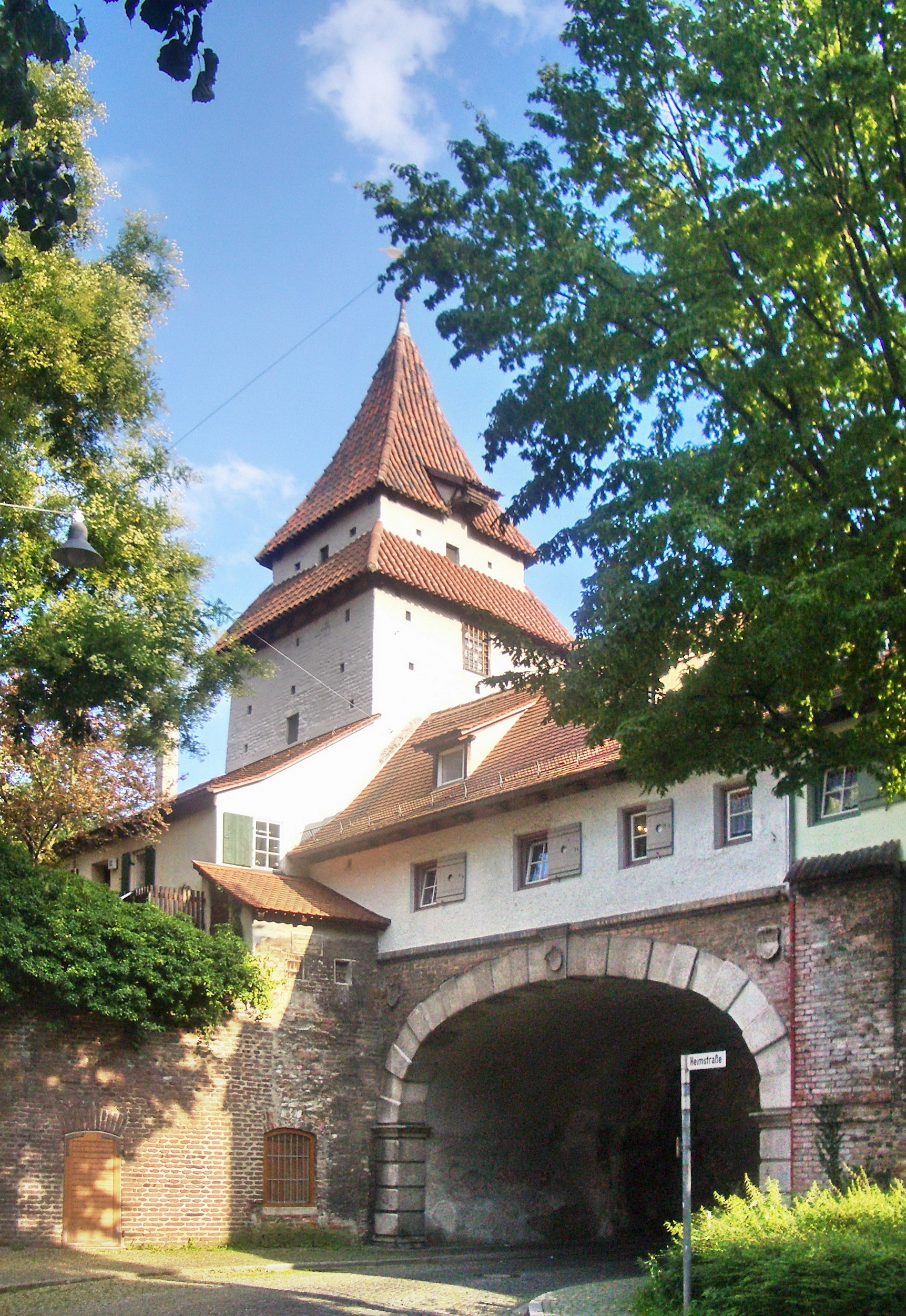 Zundeltor, Ulm an der Donau